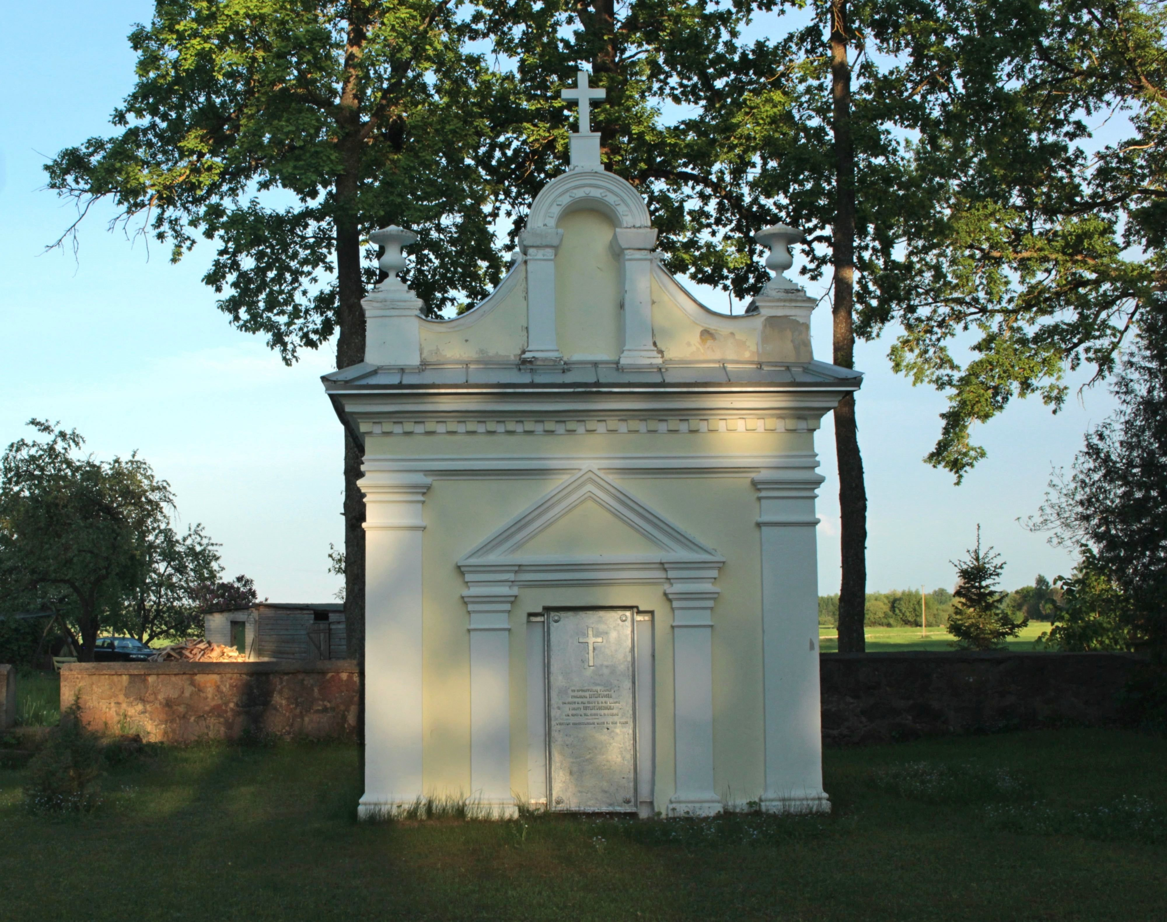 Liutkevičių šeimos mauzoliejus Vadaktų bažnyčios šventoriuje.